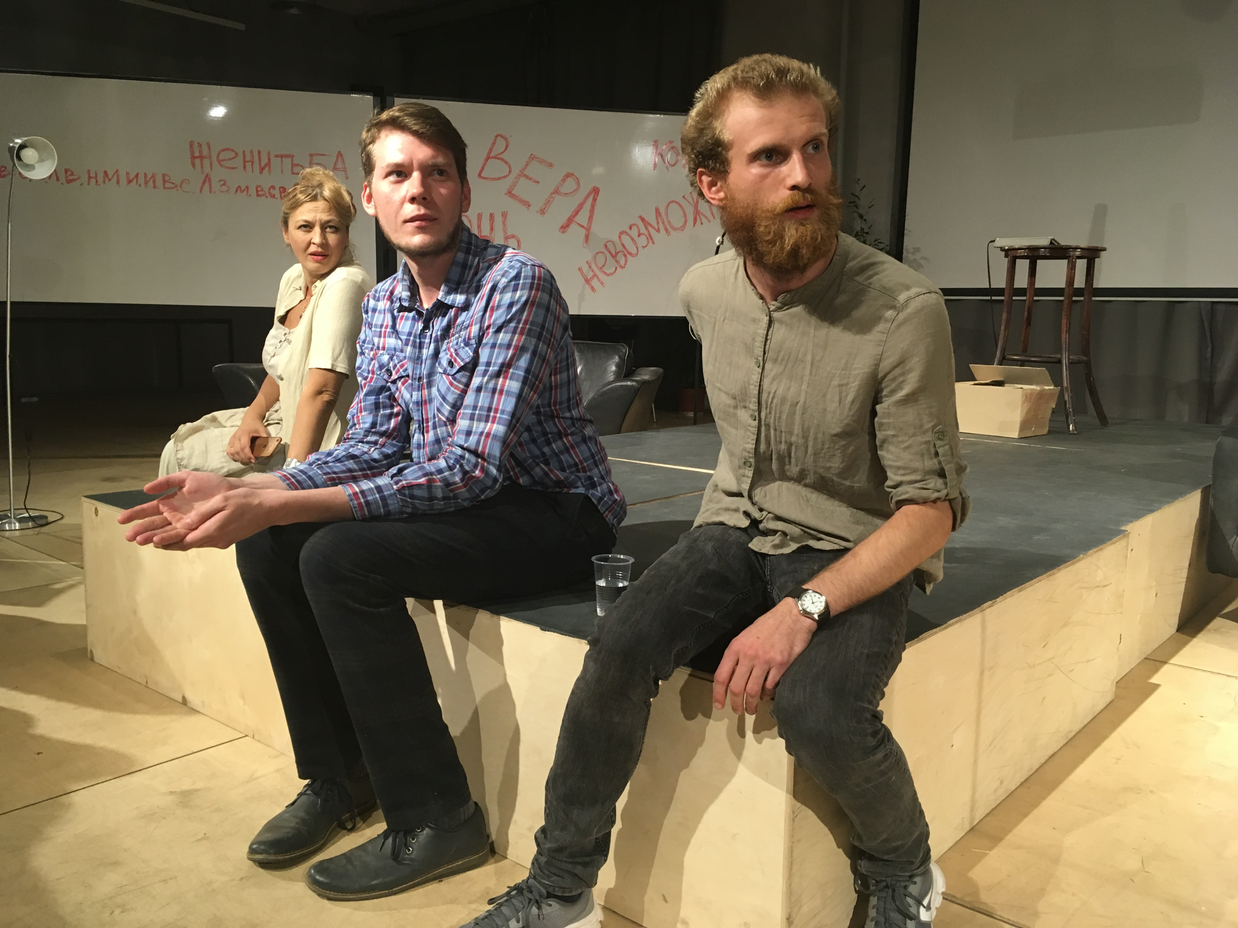 Премьерное обсуждение спектакля "И Вы поклоняетесь этому идолу", Москва, 2018